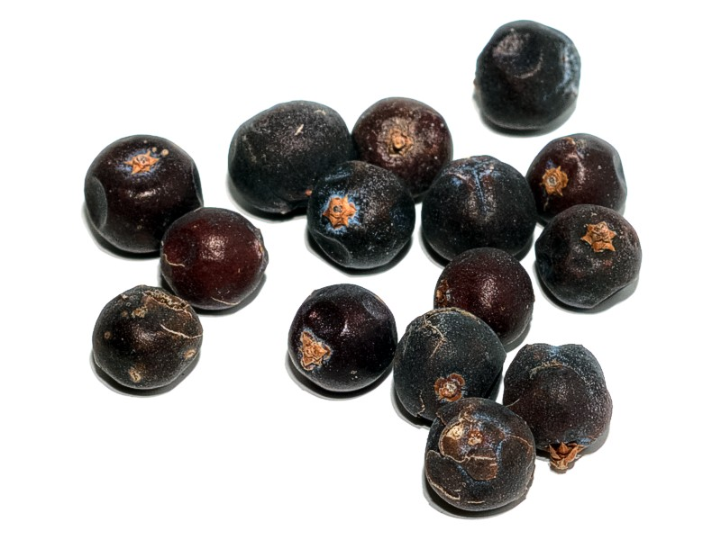 Getrocknete Wacholderbeeren